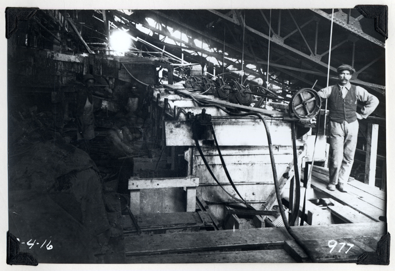 Trabajador de la mina El Teniente.